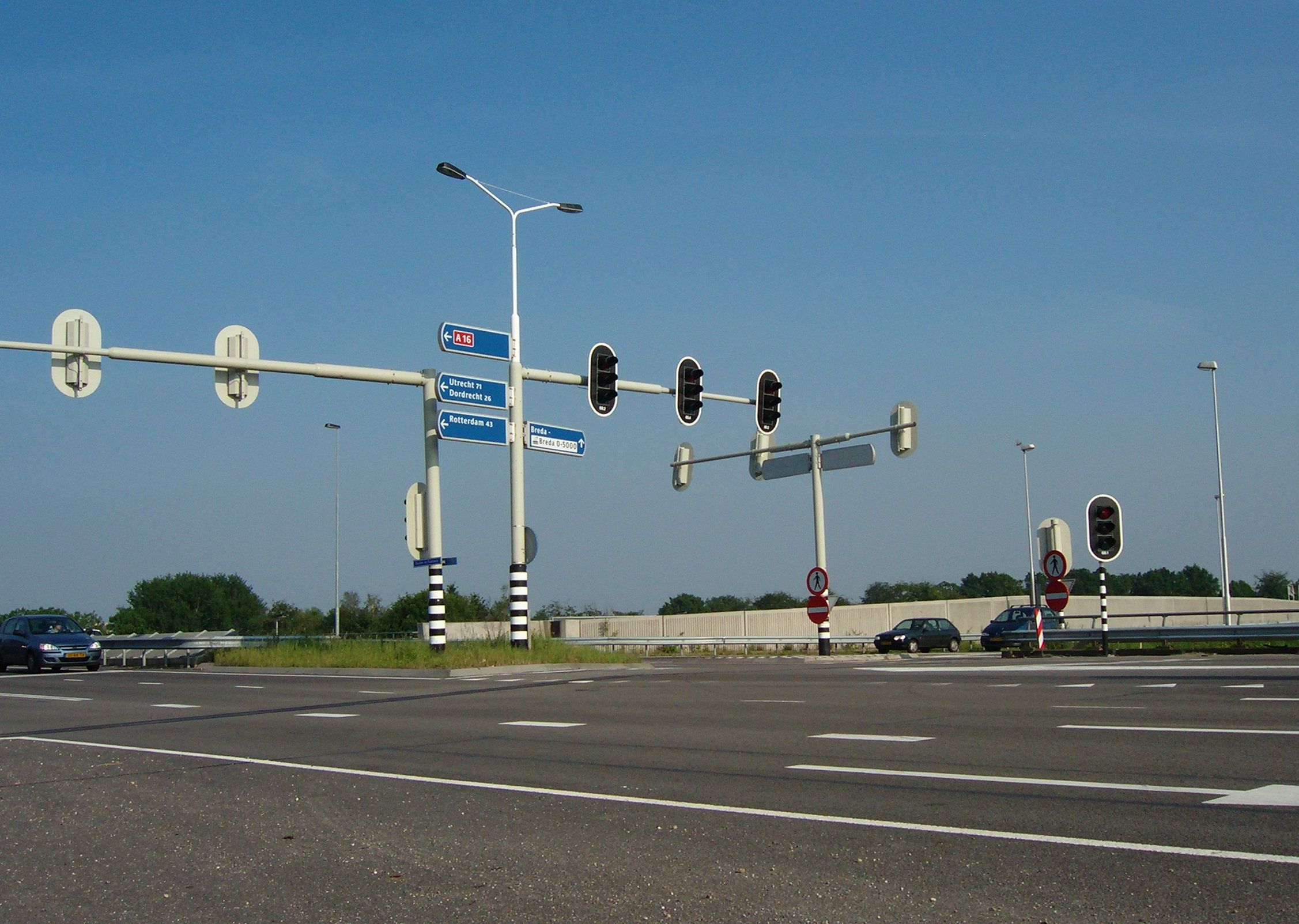 Description A16 exit Prinsenbeek/Breda, Netherlands Date08 Jun 2006SourceOwn workAuthorKliekPermission (Reusing this file) Can be used under GNU/GFDL license A16 exit Prinsenbeek/Breda, Netherlands